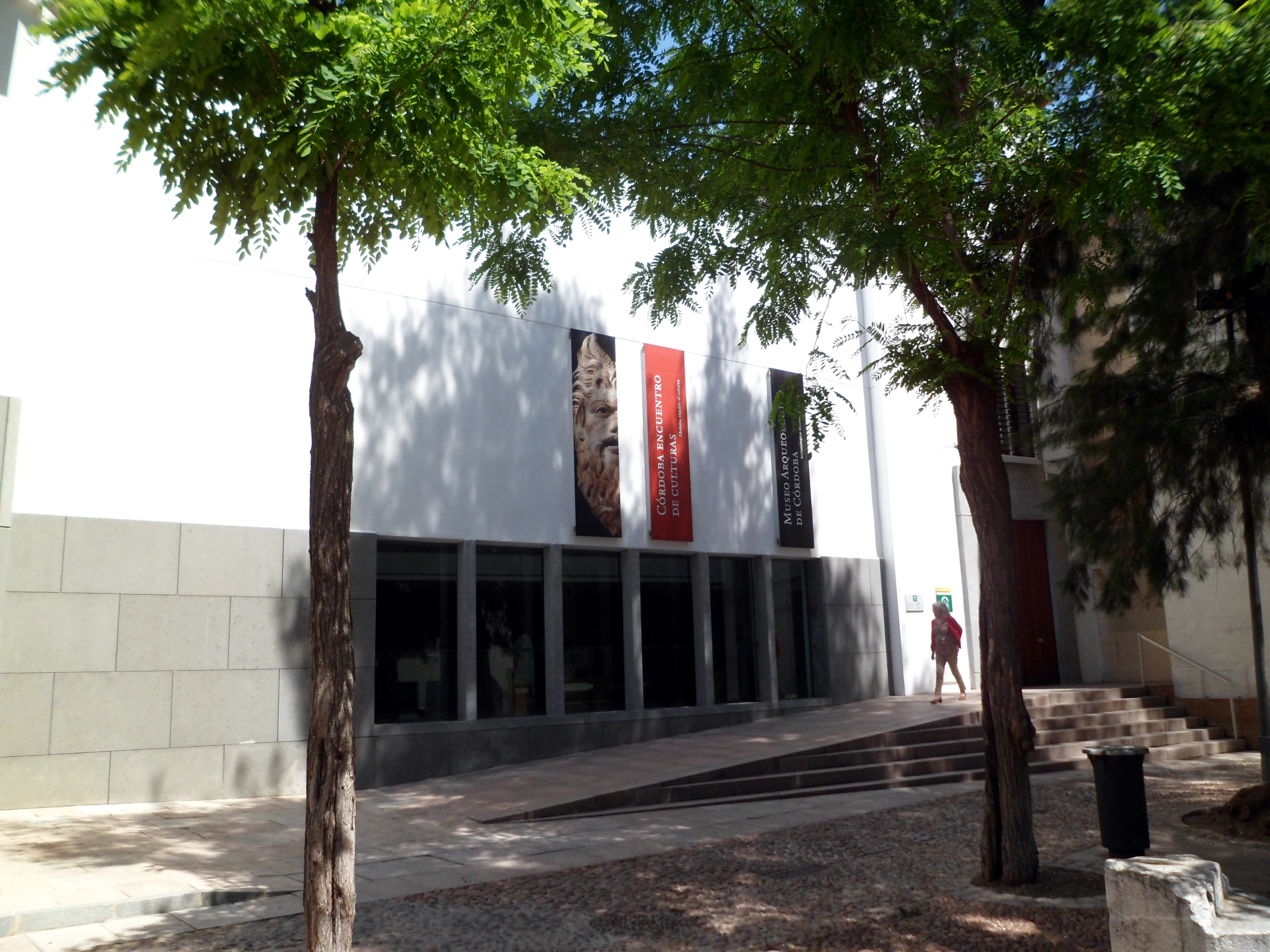 Museo Arqueológico y Etnológico de Córdoba (España).